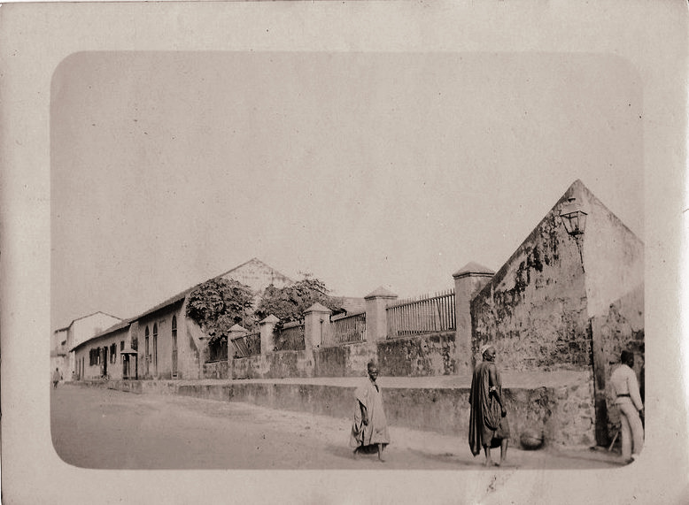 Postcard: Casas da alfãndega e Rua de São José - Bissau